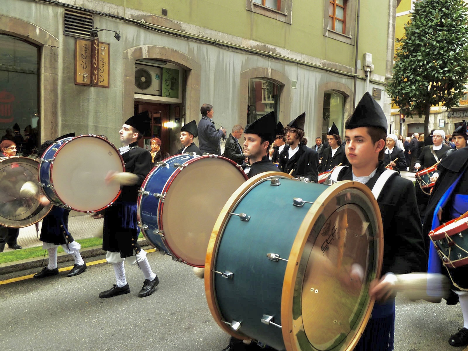 Banda de Gaitas y Acordeones Ciudad de Oviedo, en Semana Sanra.